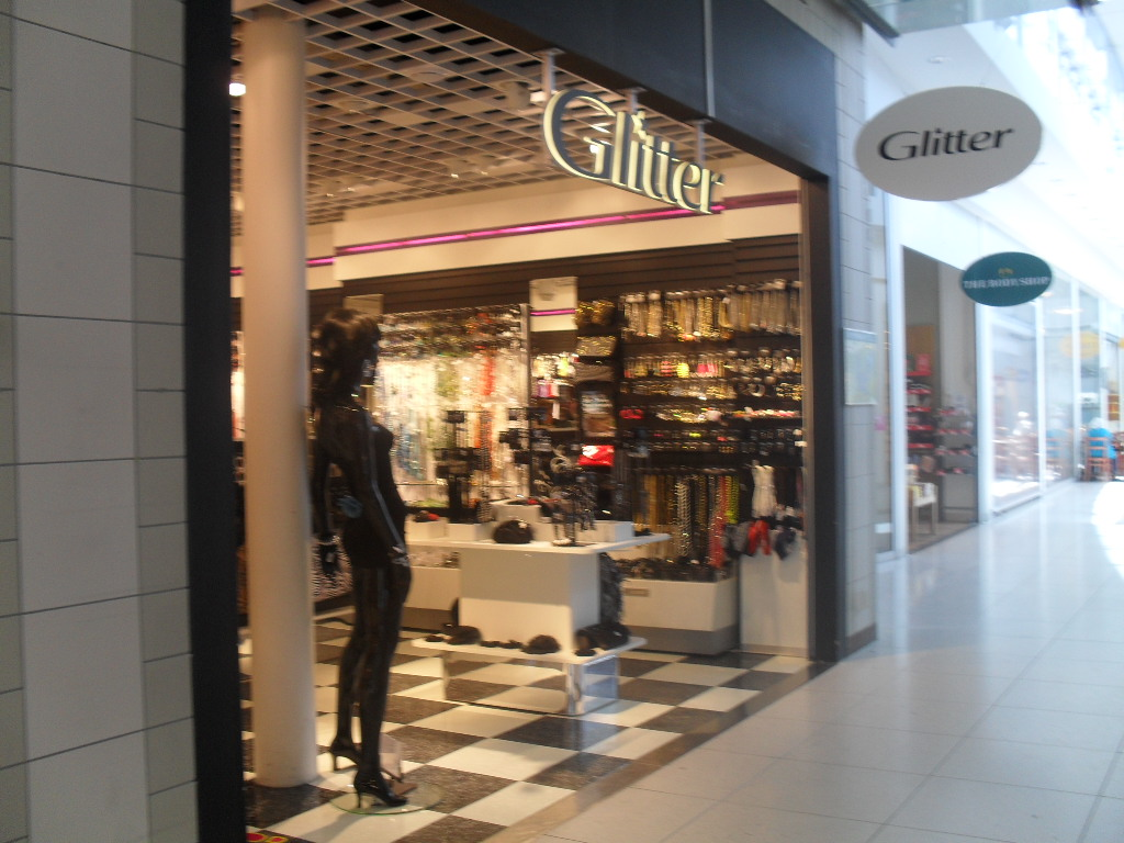 Affären Glitter